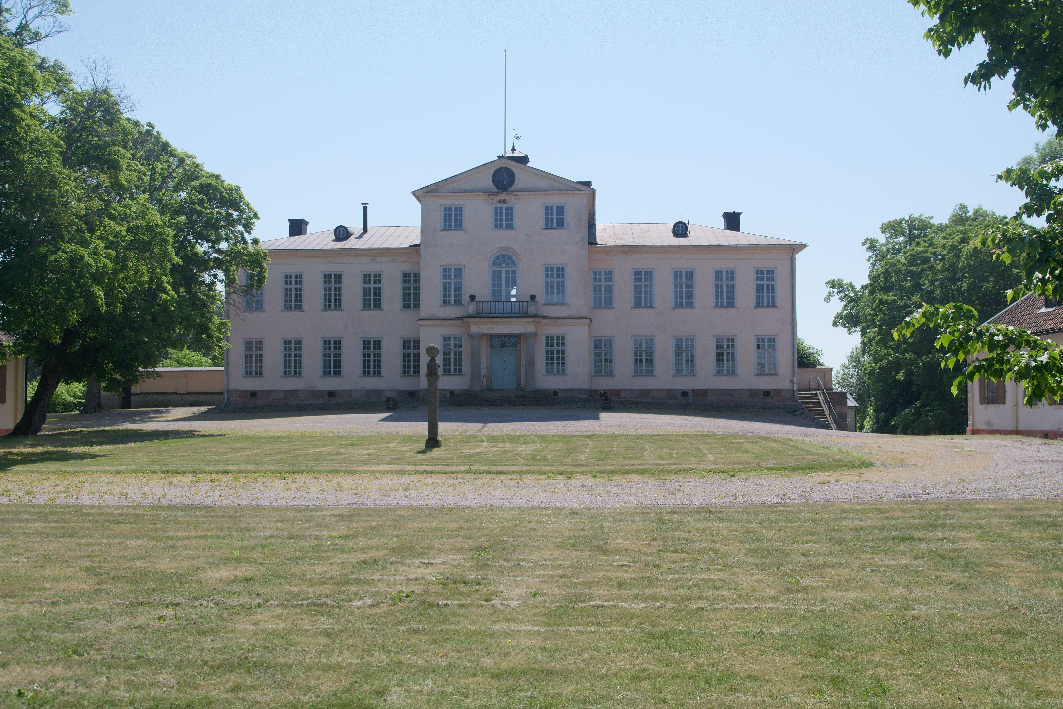 Cloudberry fotosafari